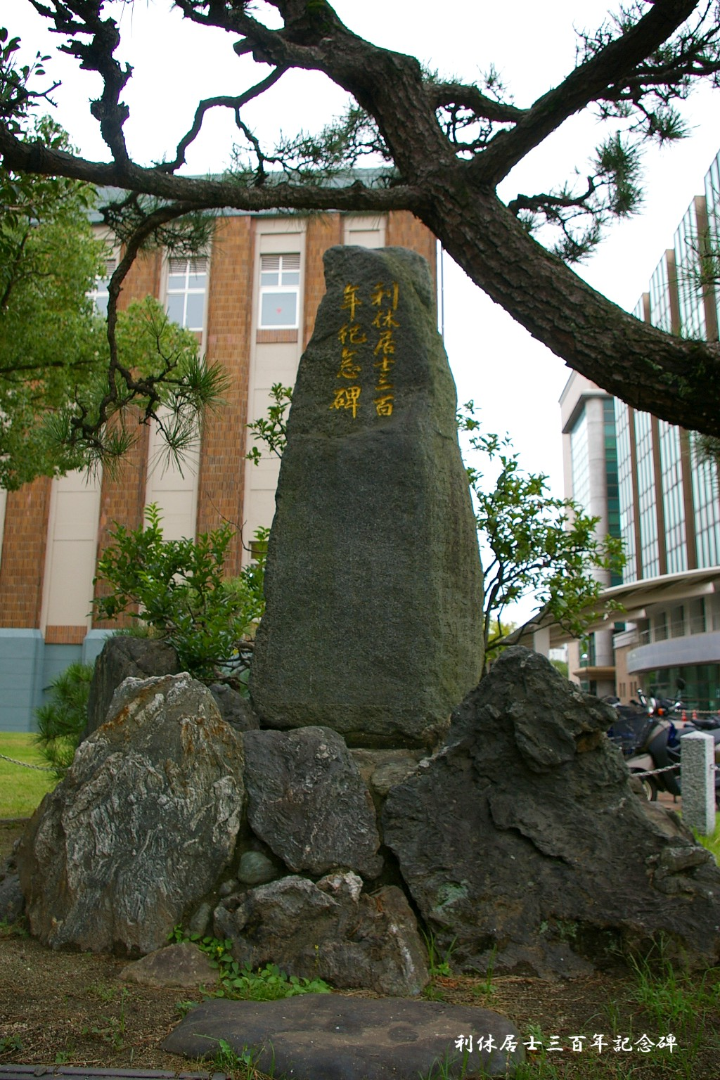 博多市内で撮影